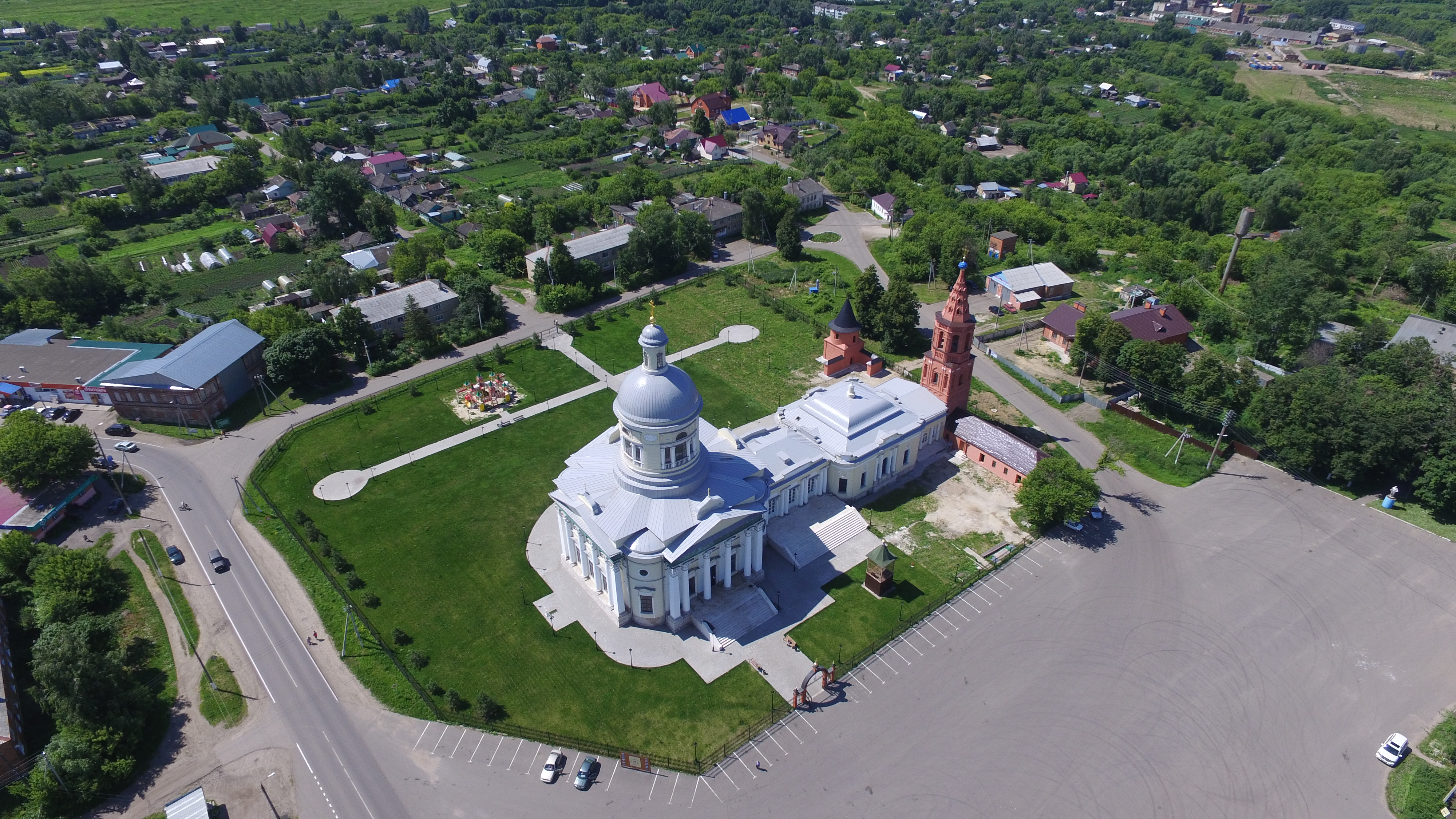 Епифань Никольский собор